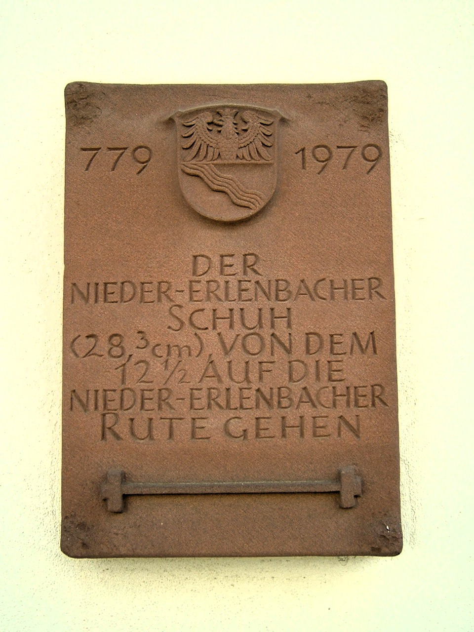 Frankfurt-Nieder-Erlenbach, Gedenkstein am Rathaus zum Niedererlenbacher Schuh, ein Längenmaß